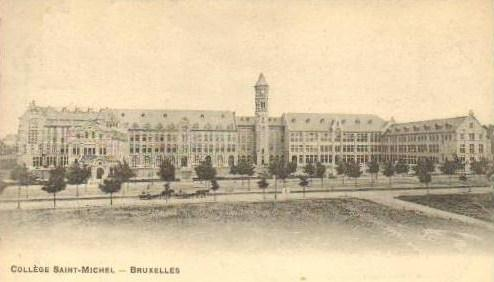 Collège Sait Michel des pères Jésuites à Bruxelles vers 1905. (Le bâtiment -sans l'église- a été achevé en 1905.)